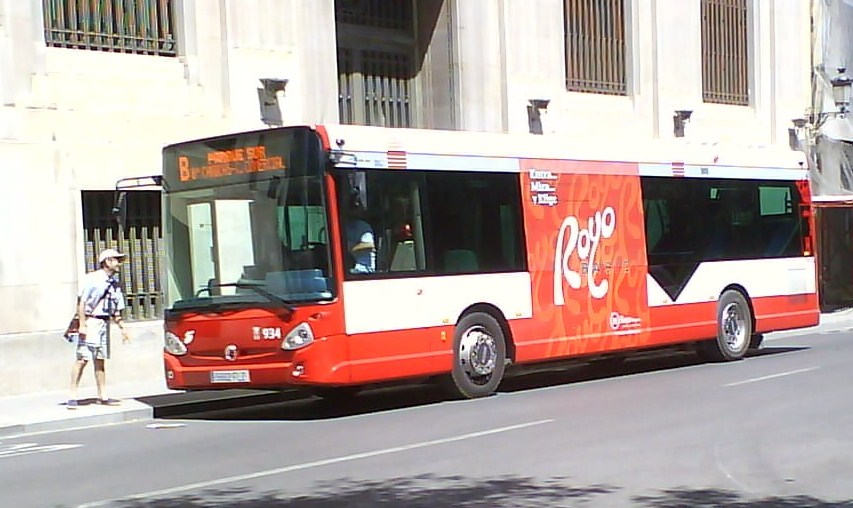 Imagen de un autobús urbano de la ciudad de Albacete